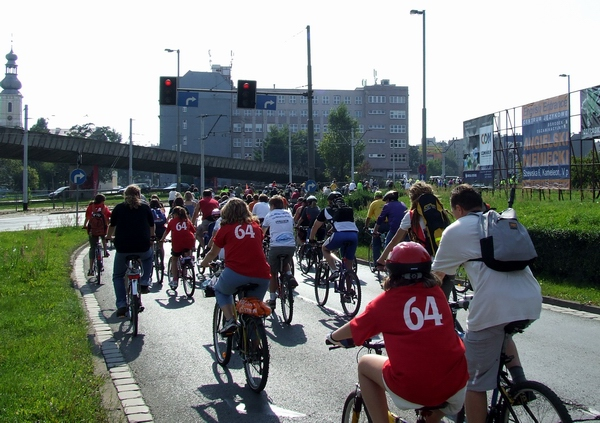 Parada Rowerów 2006 we Wrocławiu.